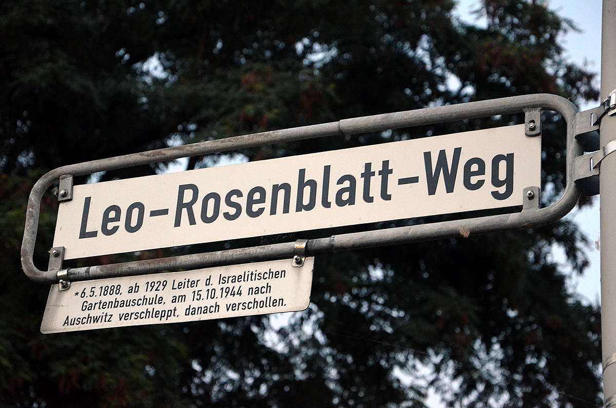 Straßenschild des 1968 angelegten Leo-Rosenblatt-Wegs in Ahlem zu gesondert angebrachter Legendentafel zu Ehren von Leo Rosenblatt: „* 6.5.1888, ab 1929 Leiter d. Israelitischen Gartenbauschule, am 15.10.1944 nach Auschwitz verschleppt, danach verschollen.“ ...